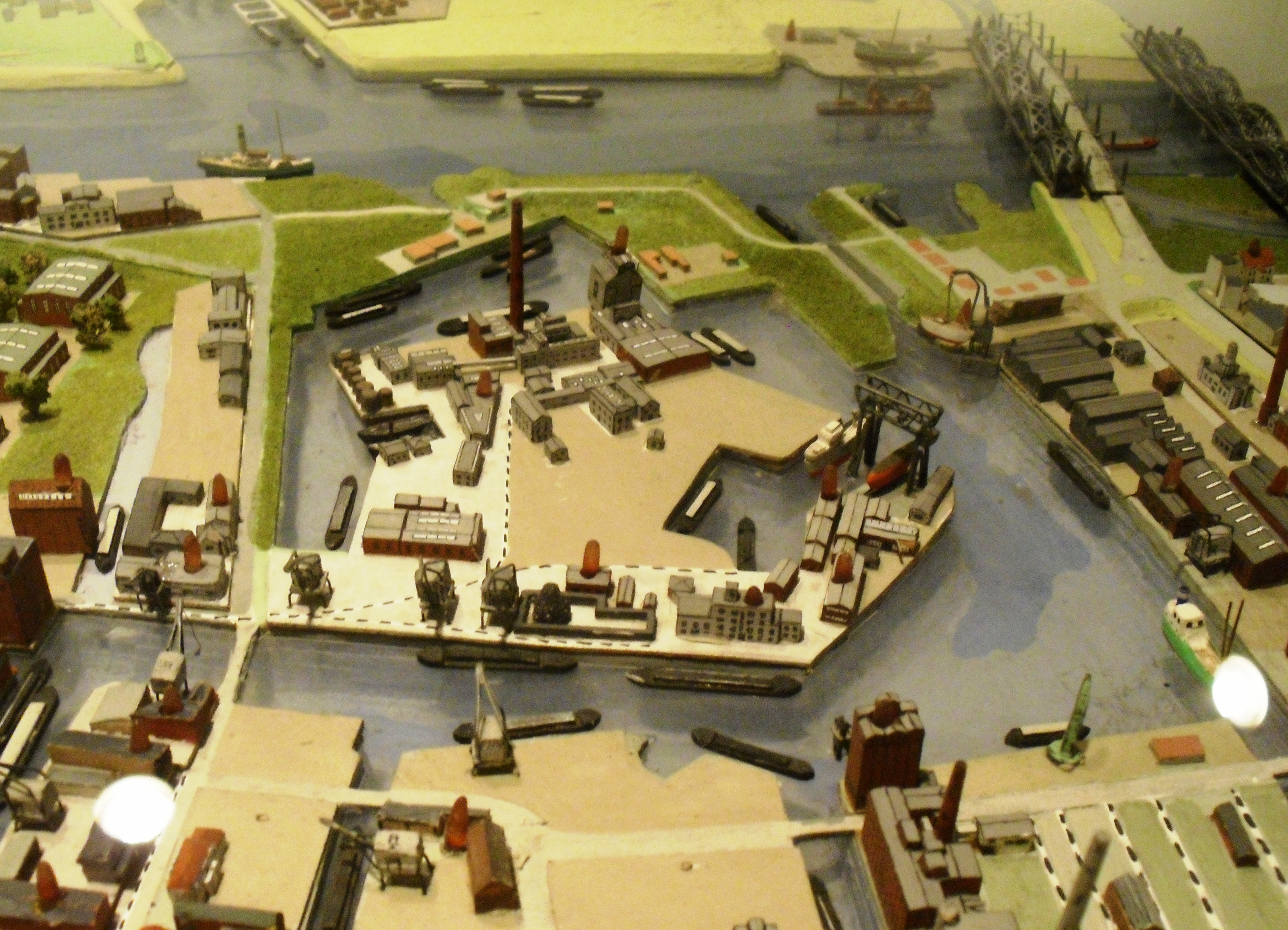 Modell des Harburger Hafens